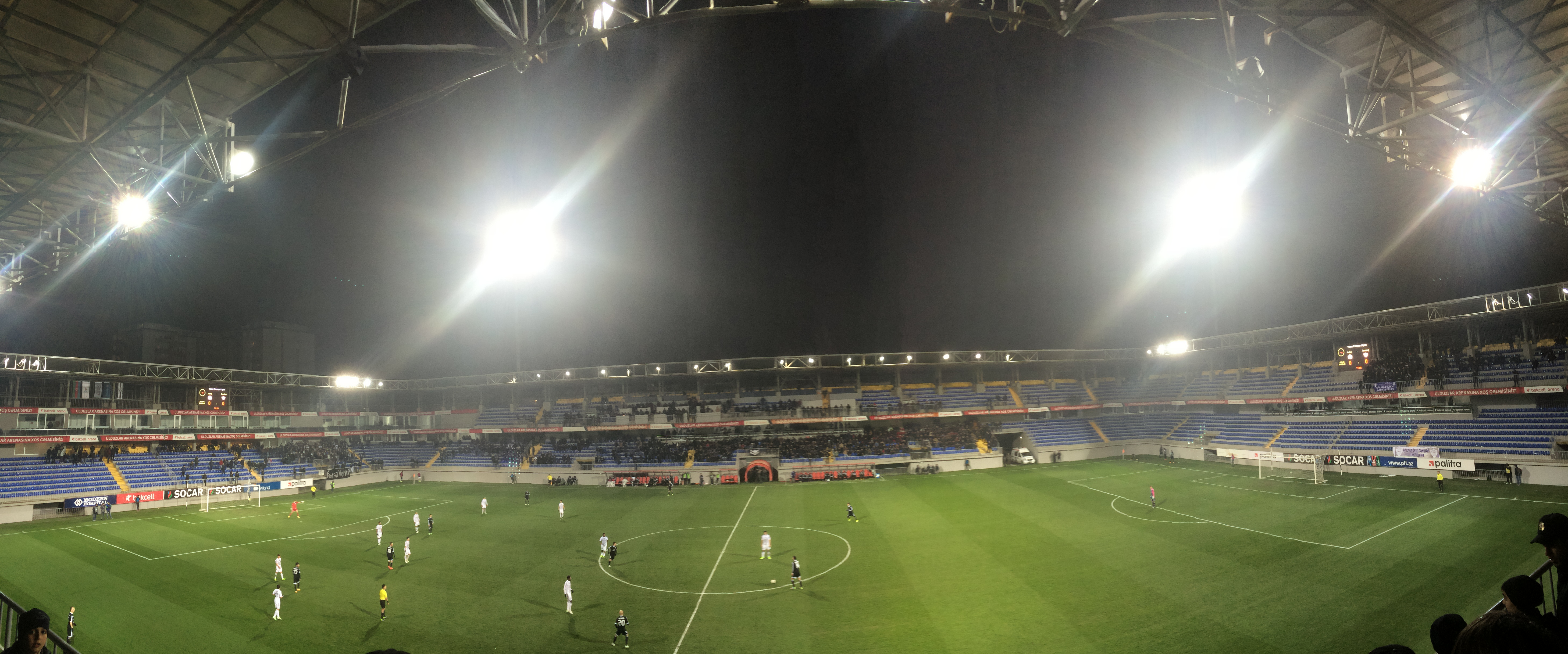 Bakcell Arena